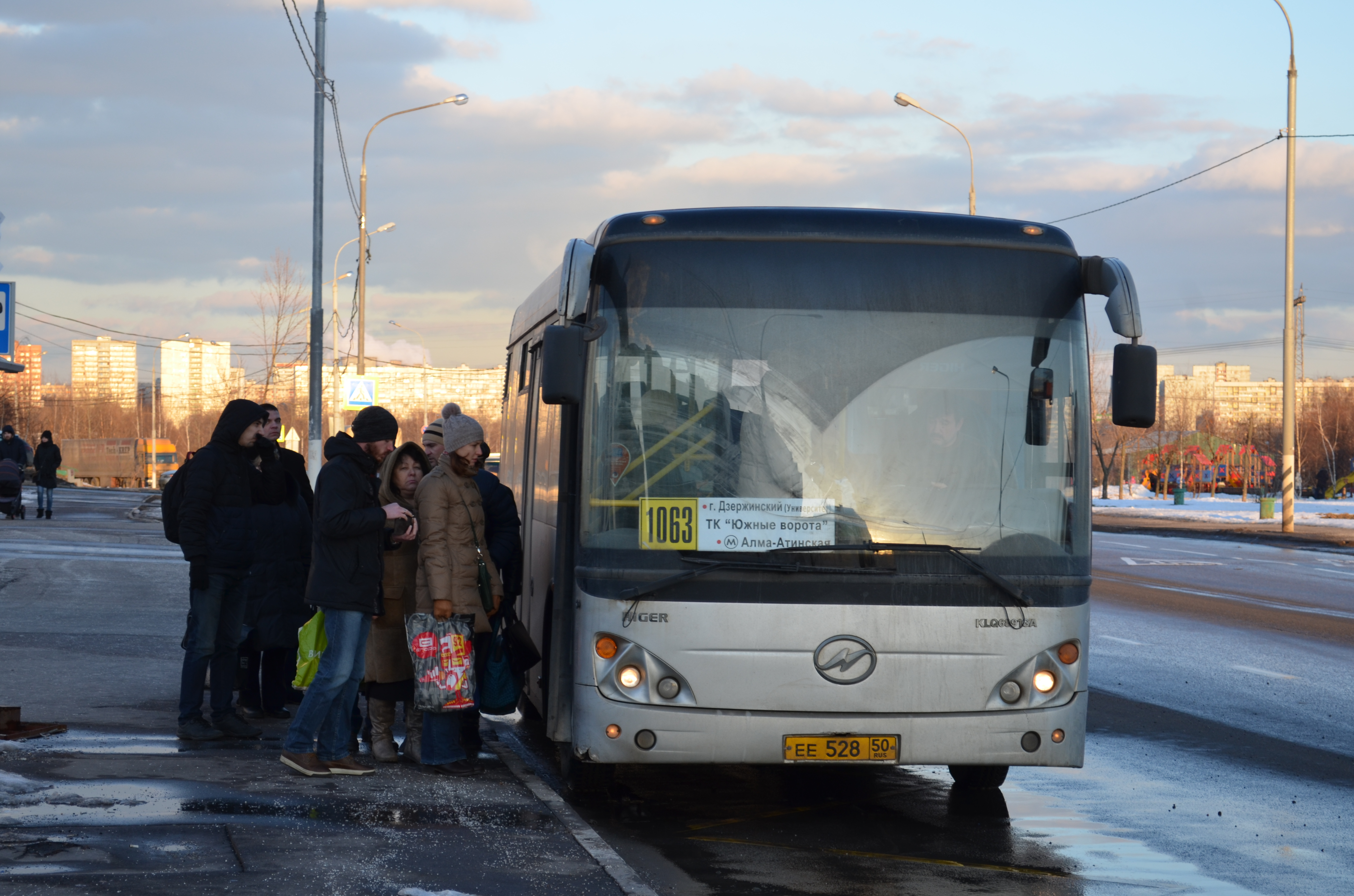 Посадка на дзержинский автобус маршрута № 1063 («Рейс») у станции метро «Алма-Атинская» в районе Братеево.